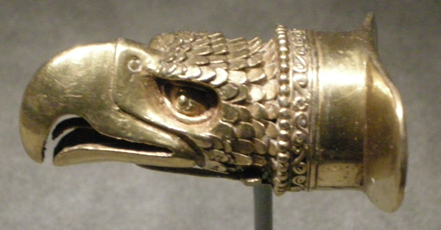 Museo civico (Torino). Cultura mixteca-azteca, ornamento labiale a forma di testa d'aquila in oro, 1200-1521 ca.